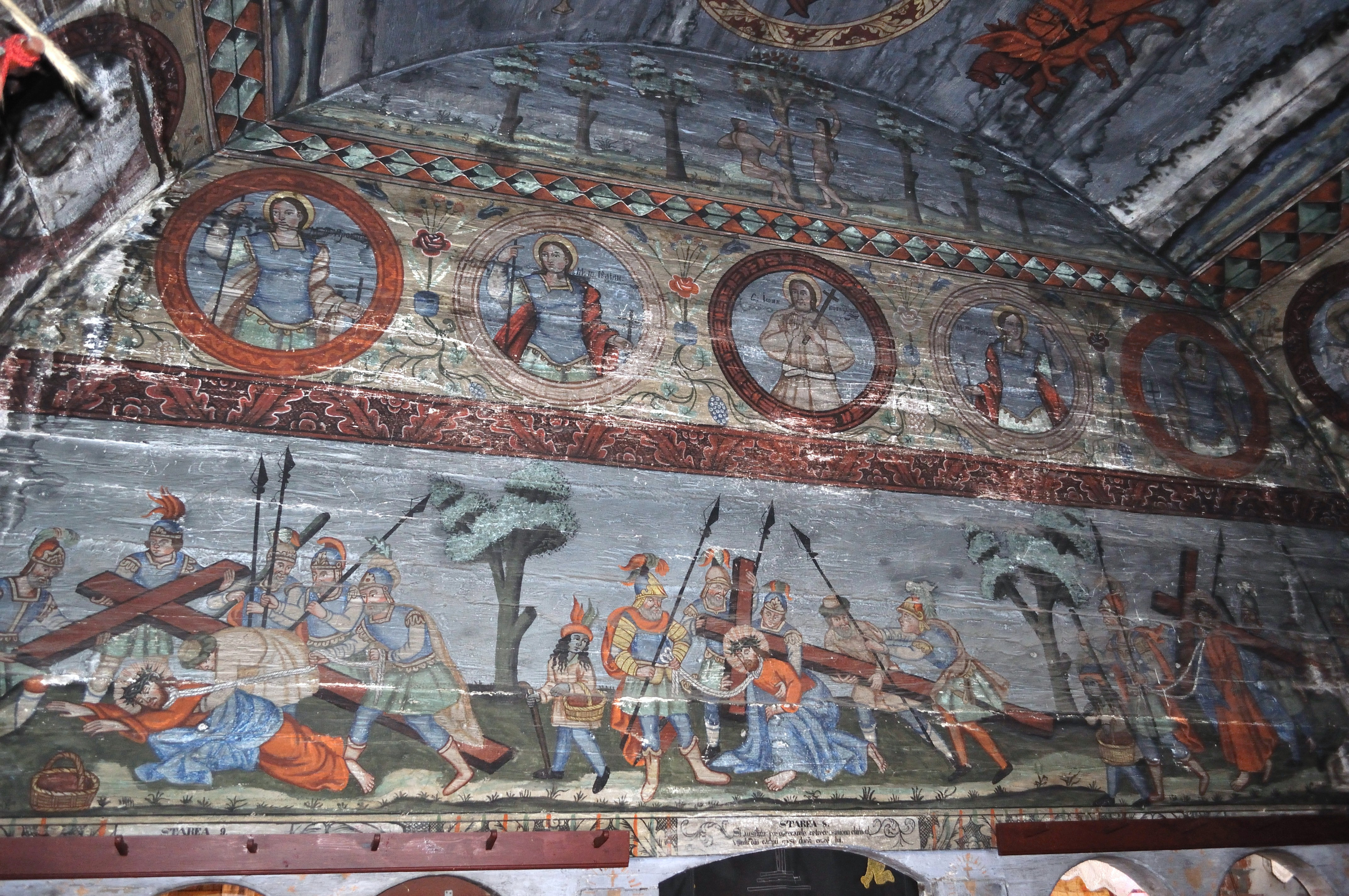 Biserica de lemn „Sfinții Arhangheli” din Ciuleni, județul Cluj